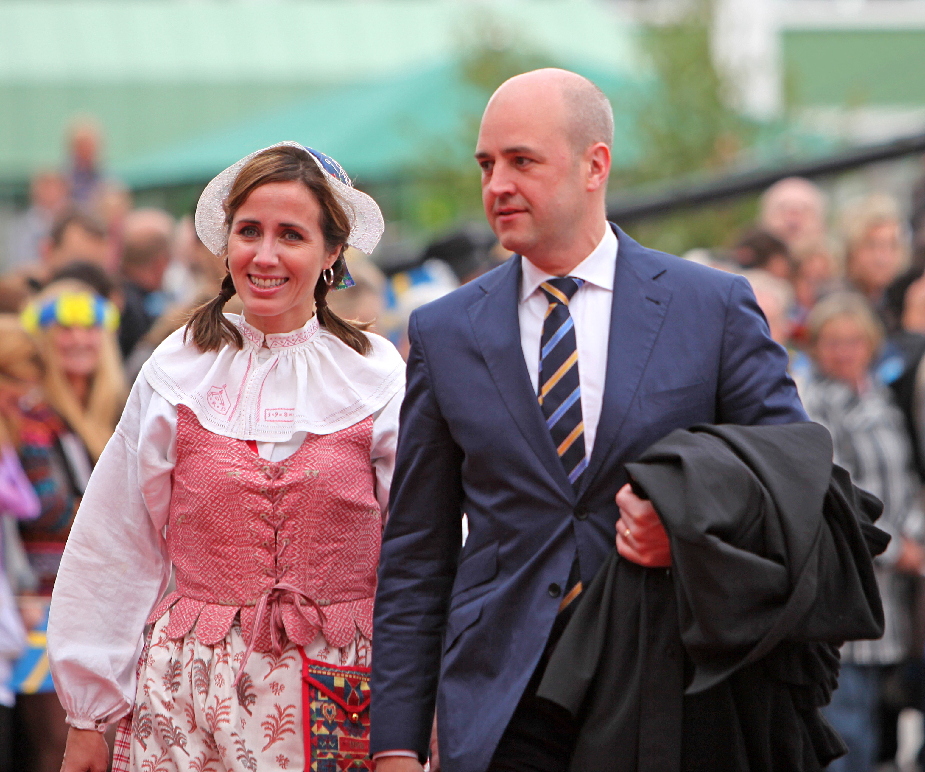 Statsminister Fredrik Reinfeldt och fru under Svenska Nationaldagen på Skansen 2009